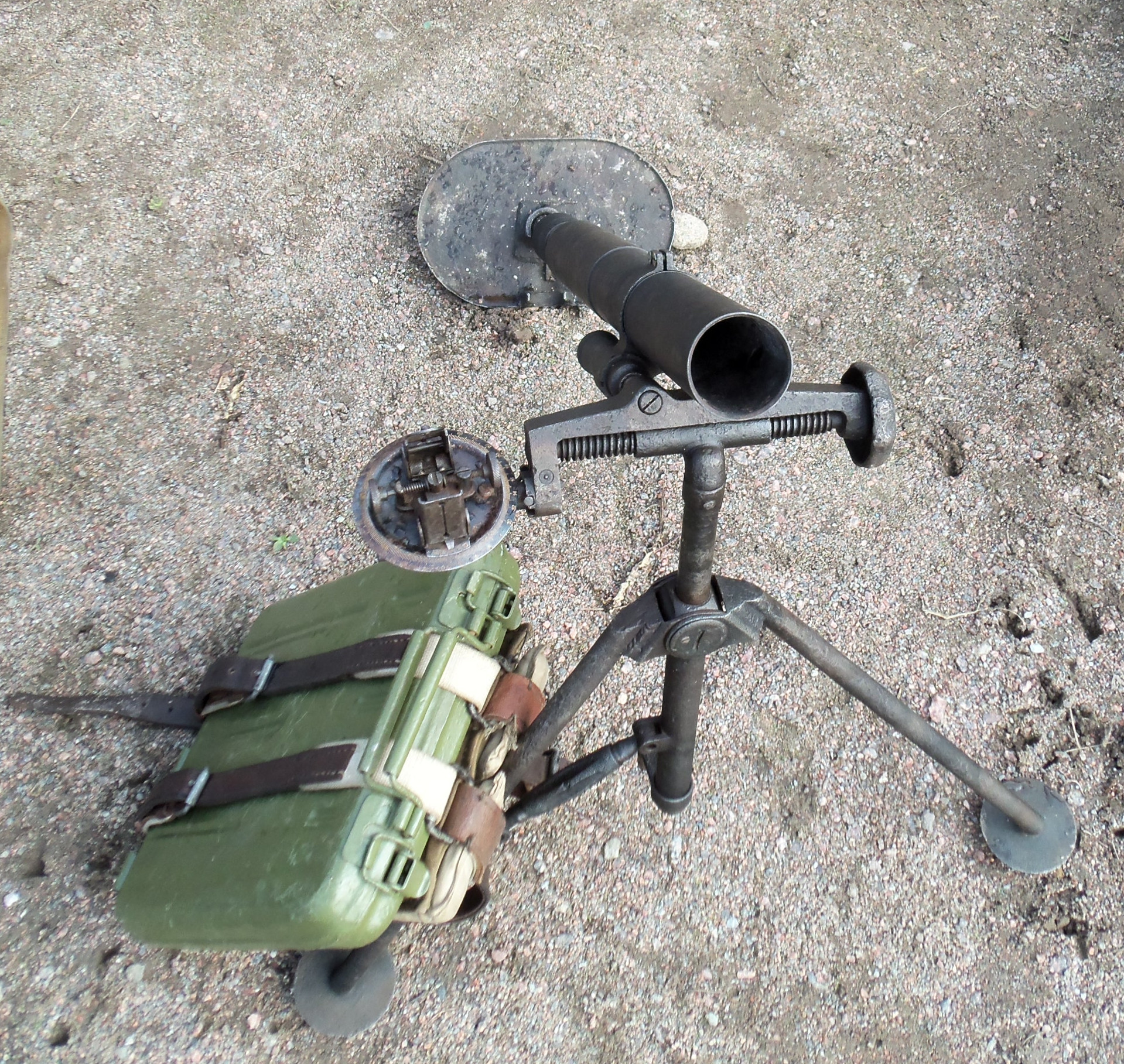 Ротный миномёт образца 1938 года на выставке военной техники «Встречаем Победу в Политехническом» 5 мая 2012 года